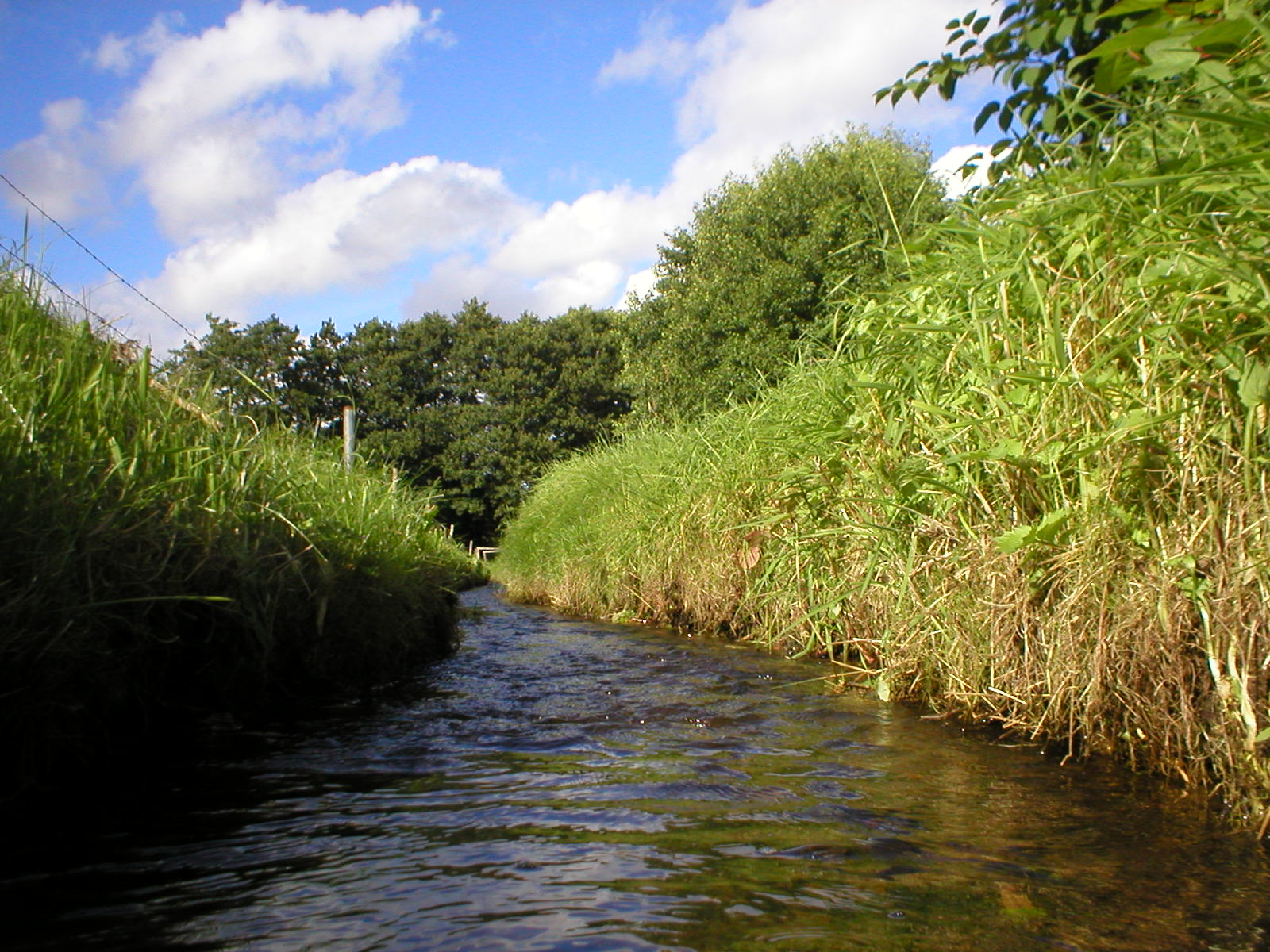 Die Ballbek